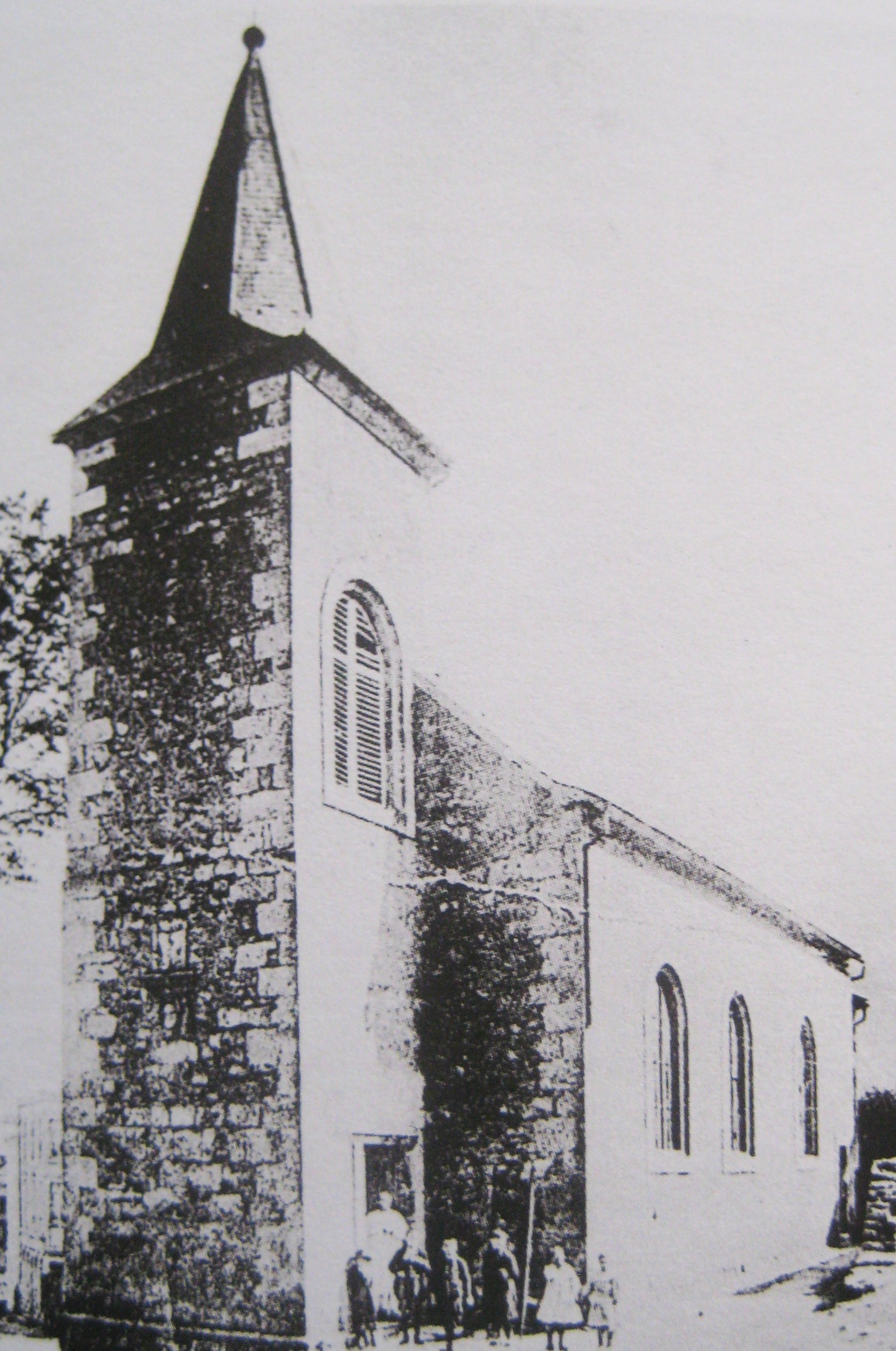 Description Ancienne église paroissiale de la-Nativité-de la-Vierge Villerupt Ancienne église paroissiale de la-Nativité-de la-Vierge Villerupt